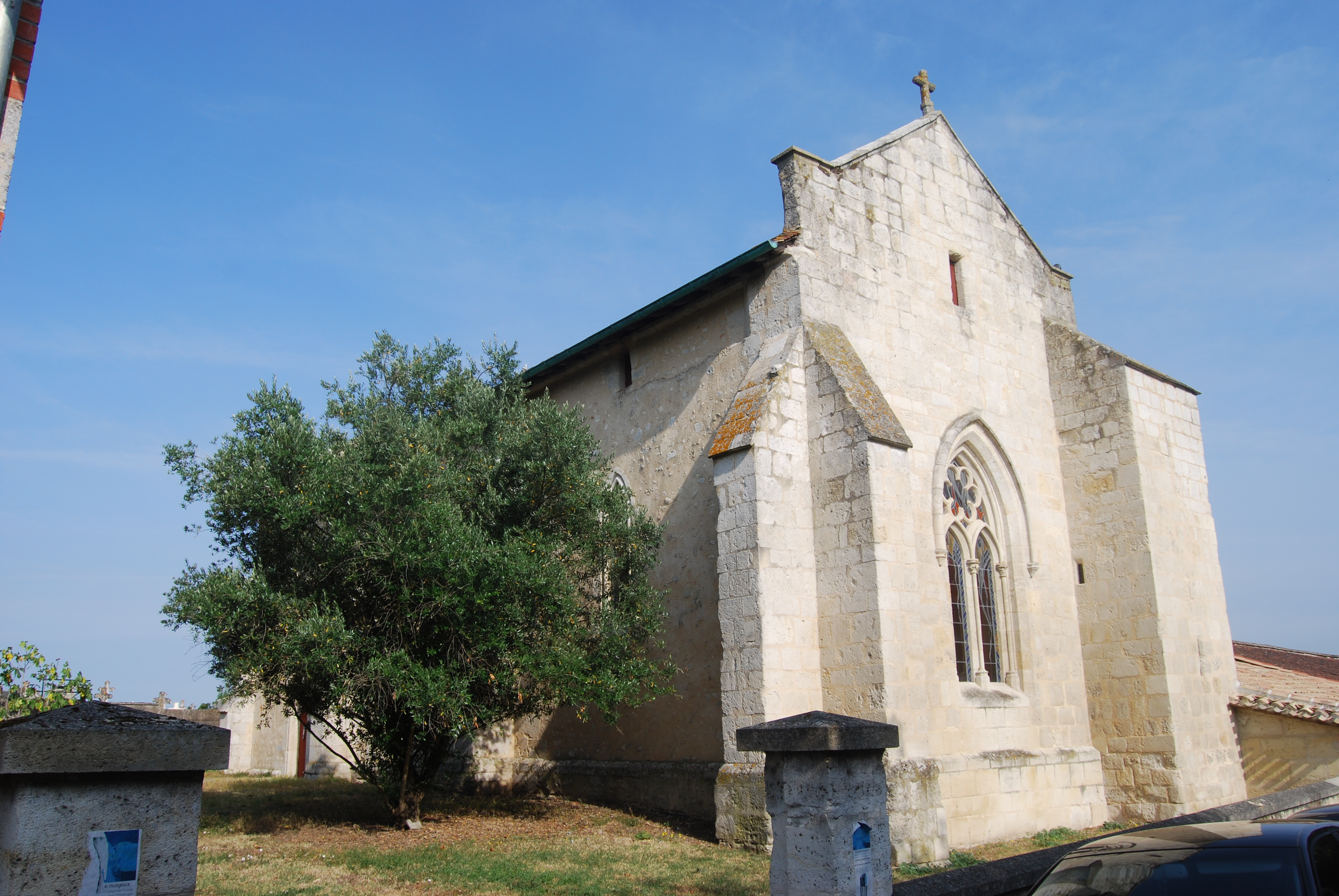 Chapelle Saint-Loup de Saint-Loubès, (Inscrit, 1992) .